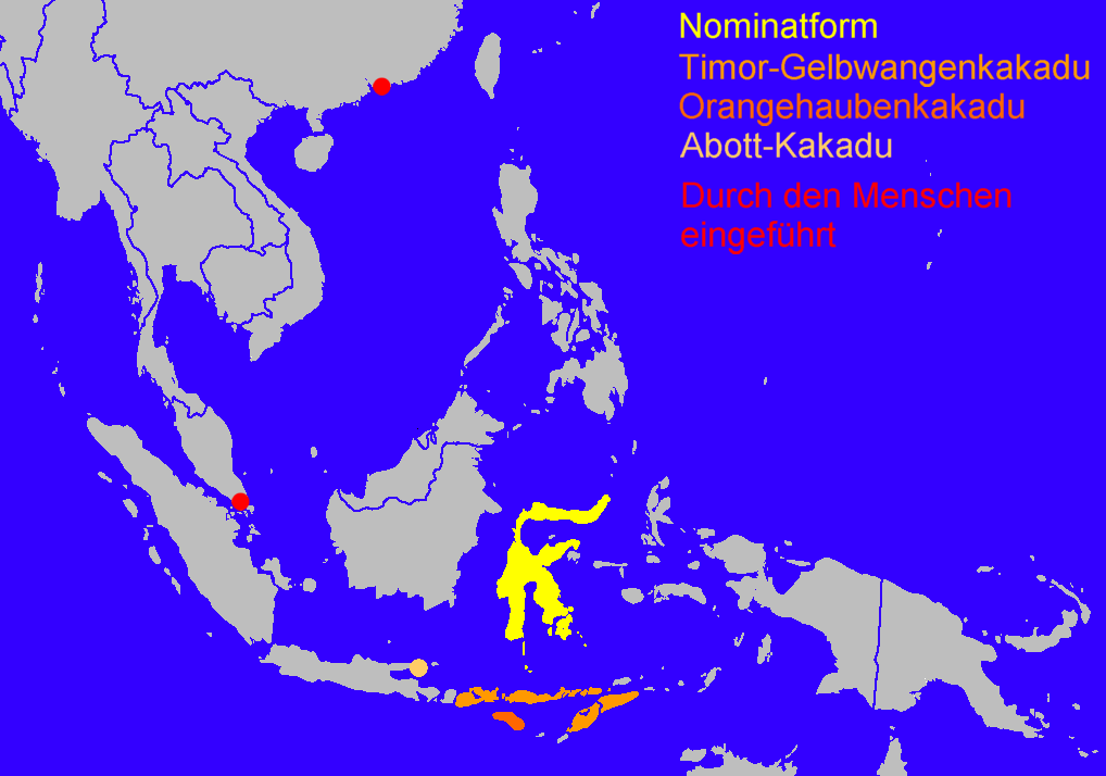 Verbreitung der Unterarten des Gelbwangenkakadus